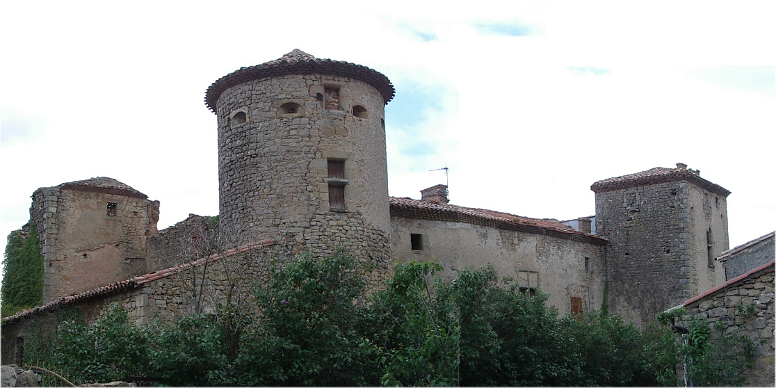 Castell de Rennes le Chateau